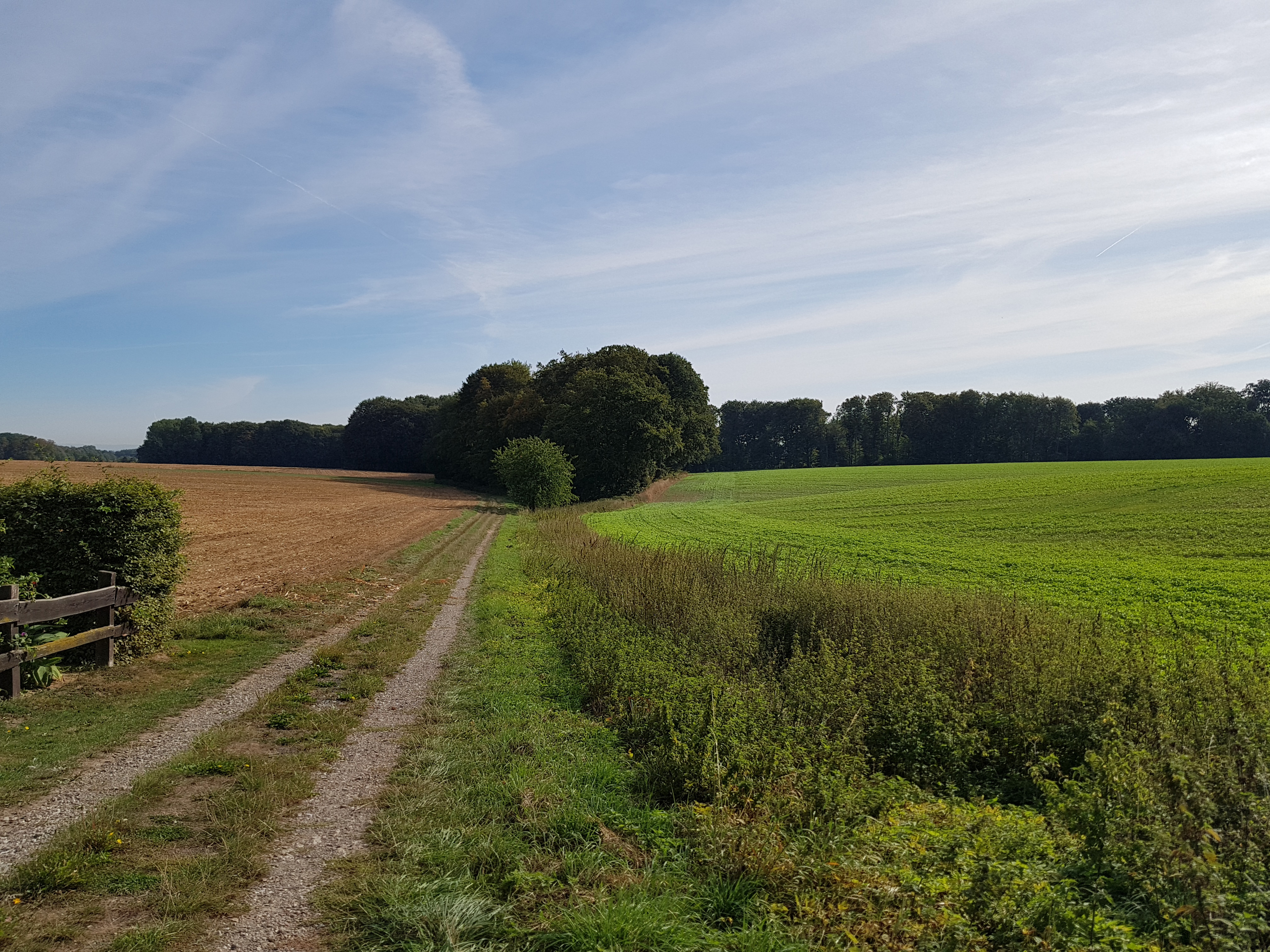 Nagelsholz: Blickrichtung Osten in das Quellsiek des Jöllenbecker Mühlenbaches (Landschaftsschutzgebiet)